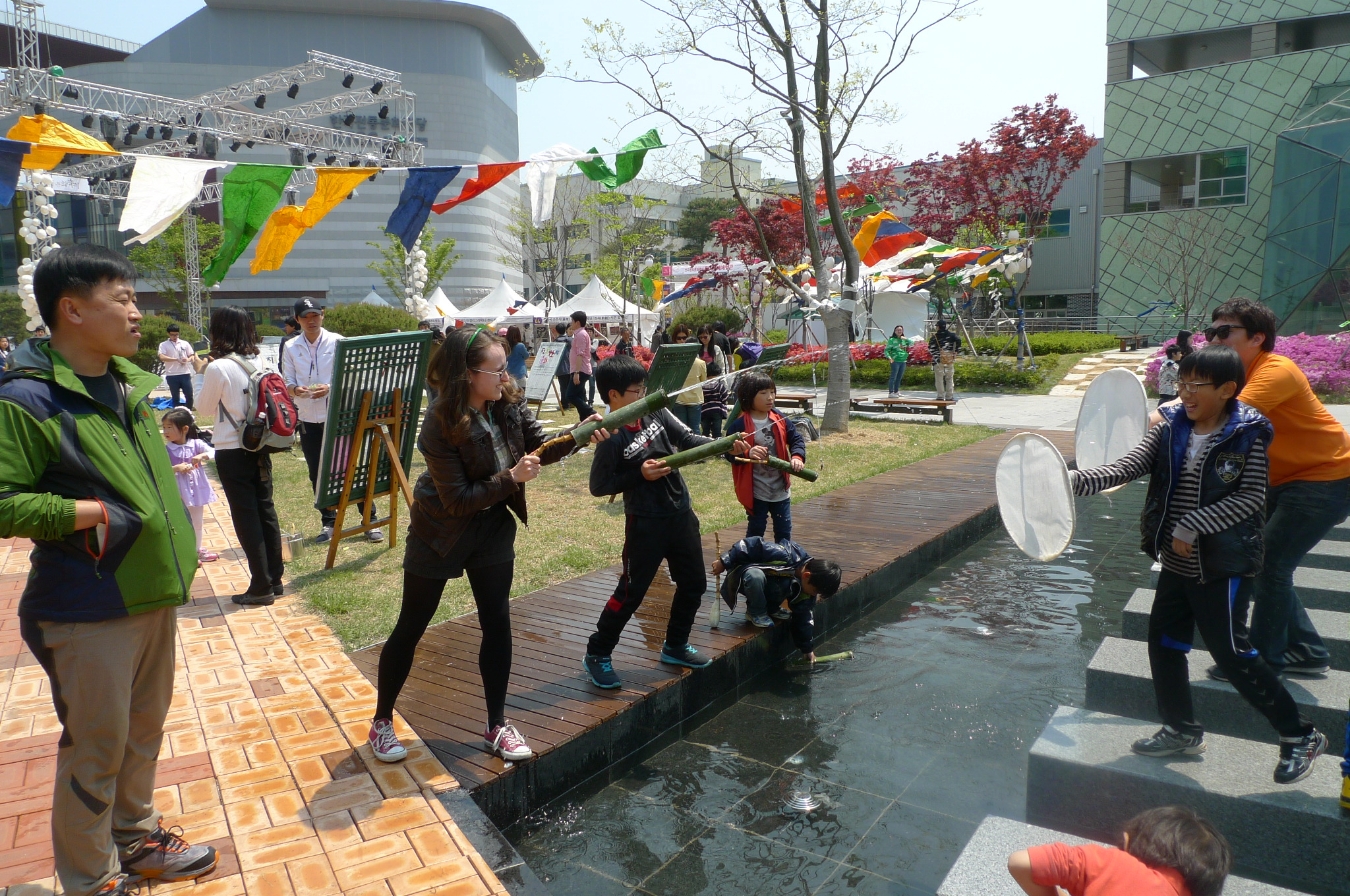 대나무총 및 한지방패를 이용한 놀이체험